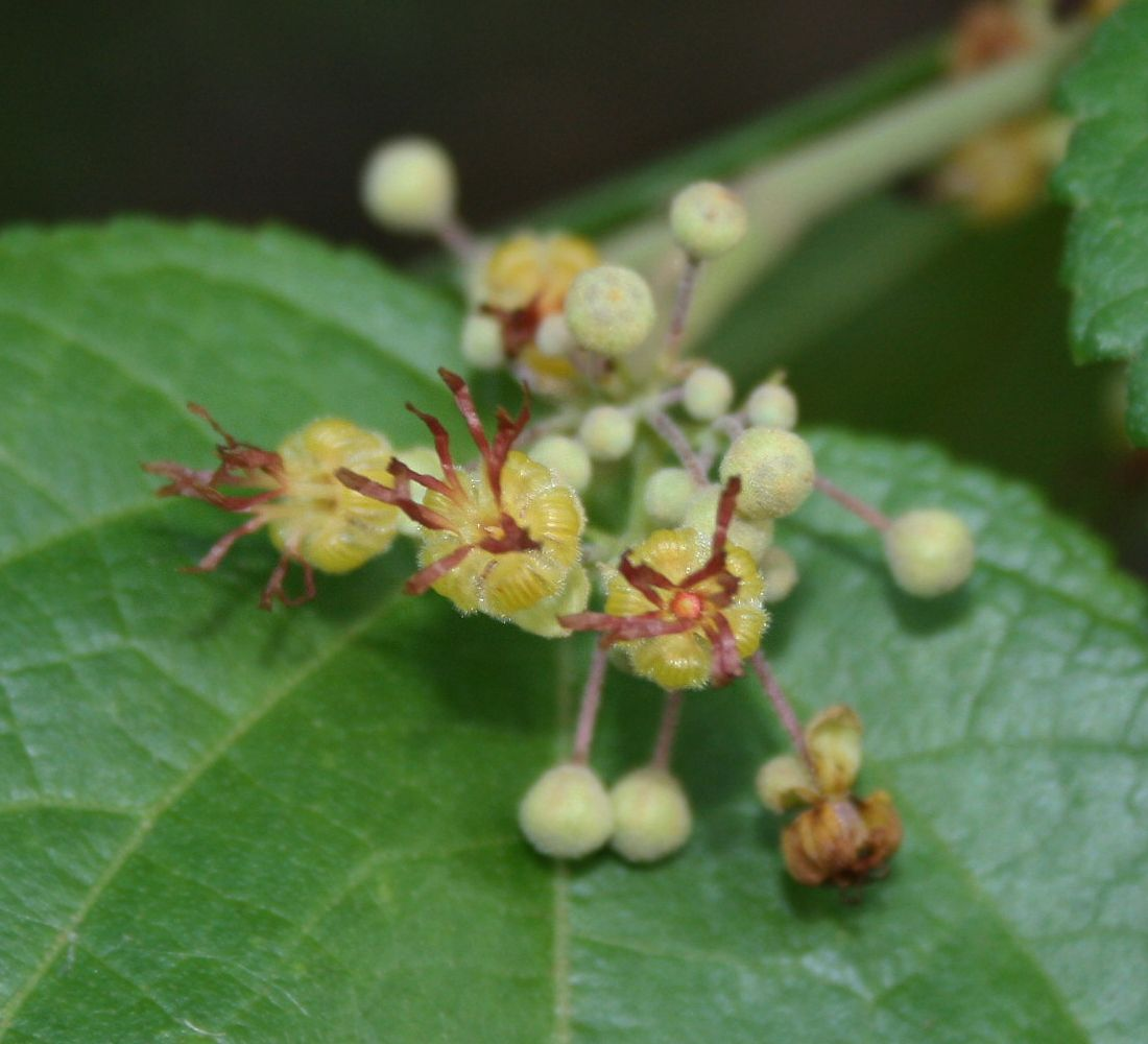 Guazuma ulmifolia, Malvengewächse (Malvaceae), Byttnerioideae - Costa Rica: Prov. Puntarenas, Hacienda Barú NW Dominical